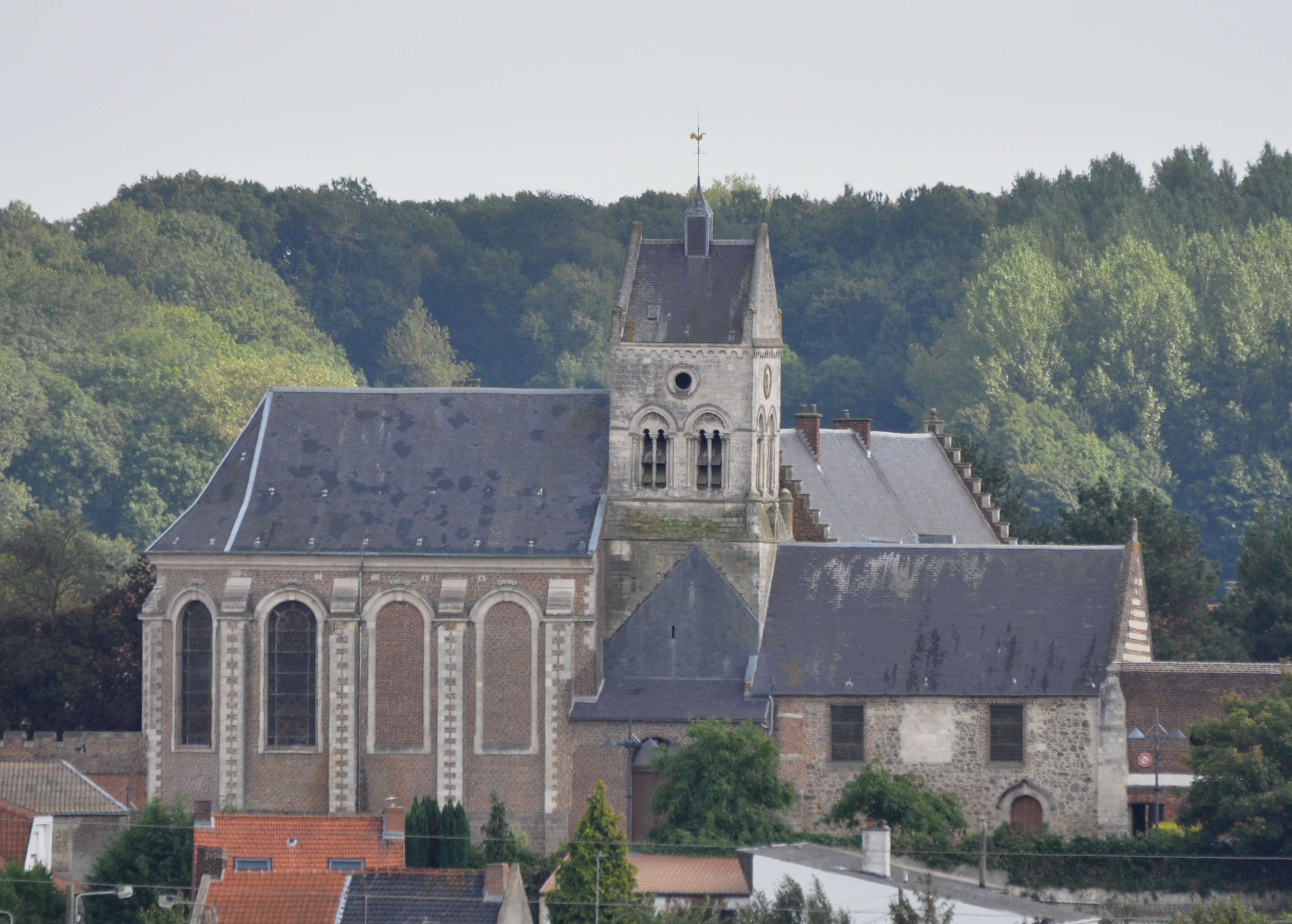 Église Sainte-Christine de Labeuvrière, (Inscrit, 1975) .